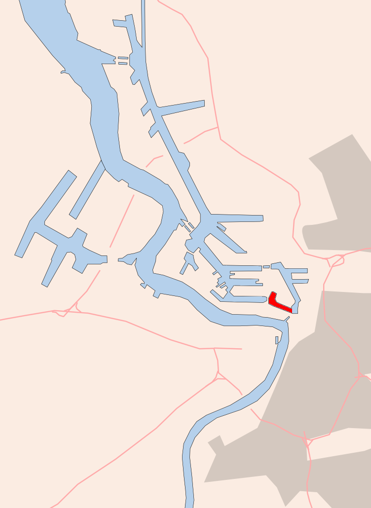 Antwerp , Amerikadok